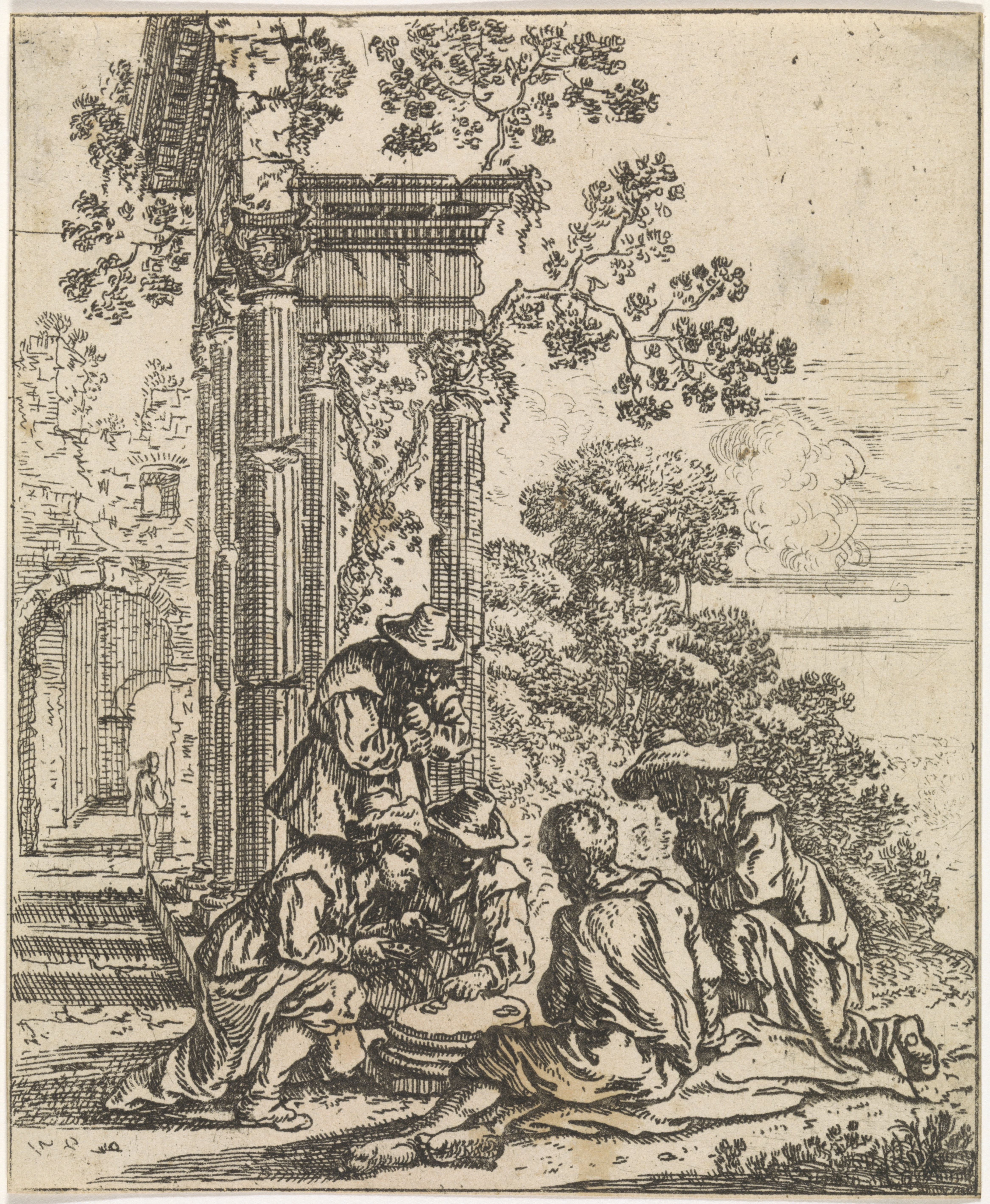 IdentificatieTitel(s): Ruïne met kaartspelersKlassieke ruïnes (serietitel)Objecttype: prent Objectnummer: RP-P-1878-A-918Catalogusreferentie: Hollstein Dutch 2Opschriften / Merken: verzamelaarsmerk, verso midden, gestempeld: Lugt 2228Omschrijving: Een ruïne, op de voorgrond spelen enkele mannen een kaartspel. De prent is deel van een zevendelige serie met antieke ruïnes.VervaardigingVervaardiger: prentmaker: Frans Geffelsnaar ontwerp van: Frans GeffelsPlaats vervaardiging: MantuaDatering: 1659 - 1671Fysieke kenmerken: etsMateriaal: papier Techniek: etsenAfmetingen: blad: h 149 mm × b 123 mmOnderwerpWat: landscape with ruinscard gamesVerwerving en rechtenVerwerving: aankoop 7-jan-1878Copyright: Publiek domein